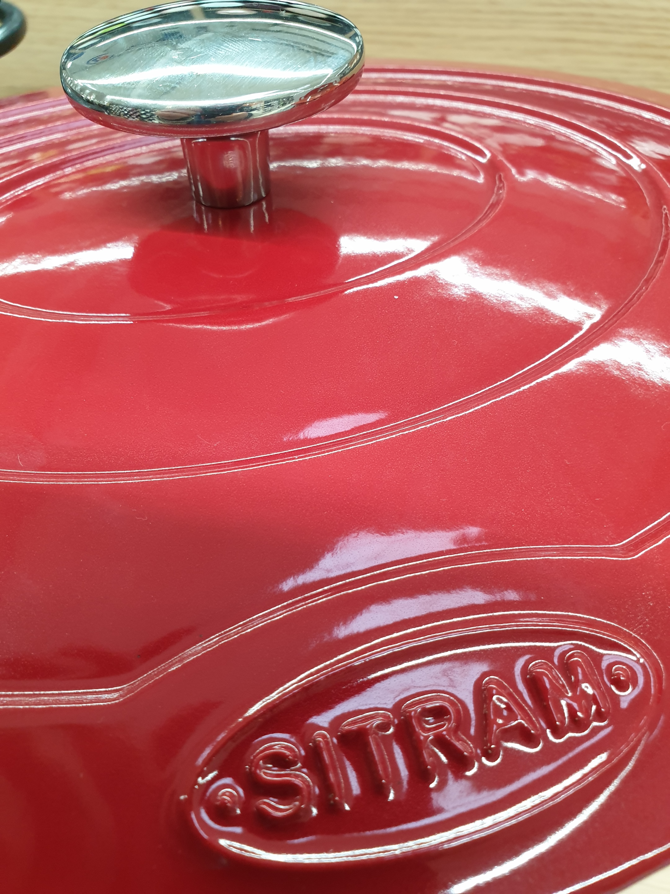 Cocotte Sitram avec logo.